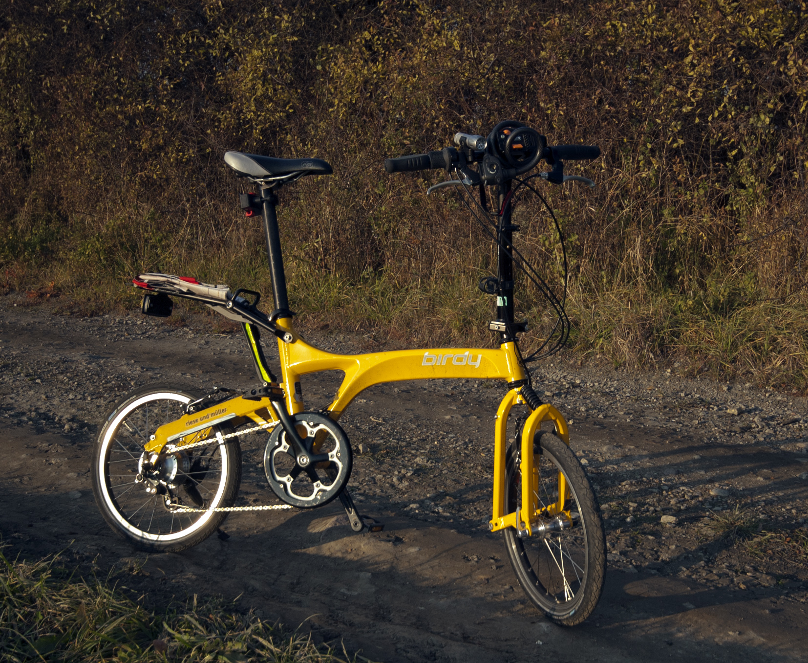 Faltrad Birdy Rohloff